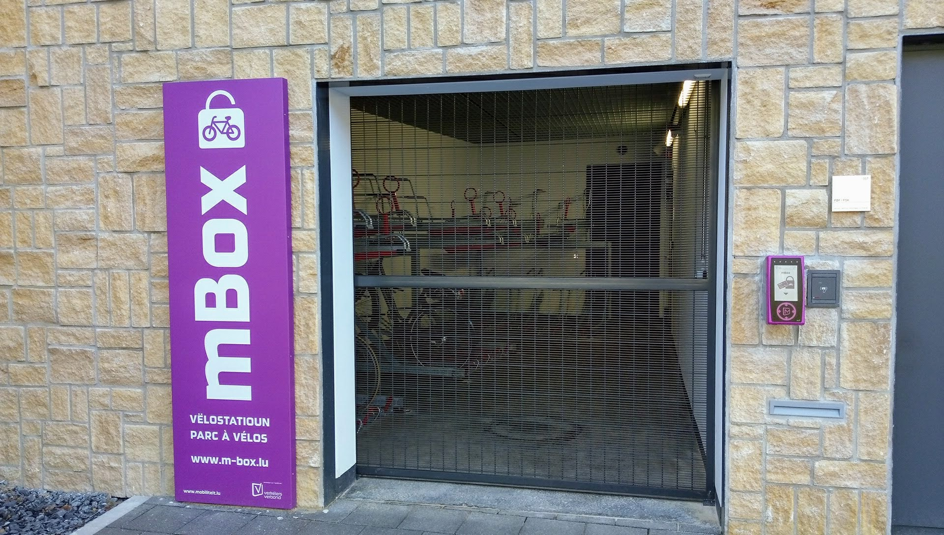 MBox bei der Gare am Pafendall